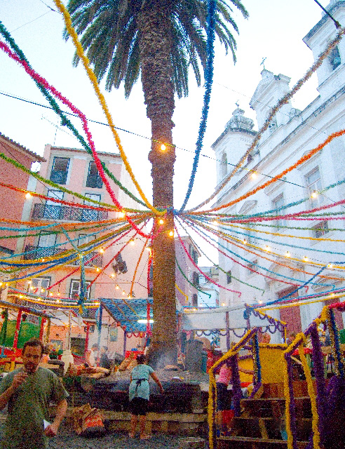 Wikipedia: Lisbona